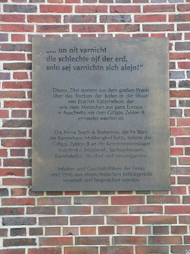 Gedenktafel am Meßberghof, zur Erinnerung an den Zyklon B-Lieferanten Tesch & Stabenow.This is a photograph of an architectural monument.